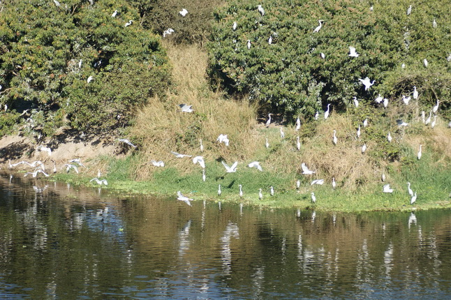 Imagem do rio Tietê no município de Botucatu, estado de São Paulo, Brasil.